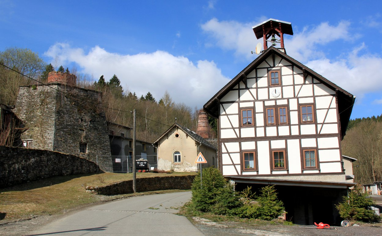 Das ehemalige Kalkwerk Herold